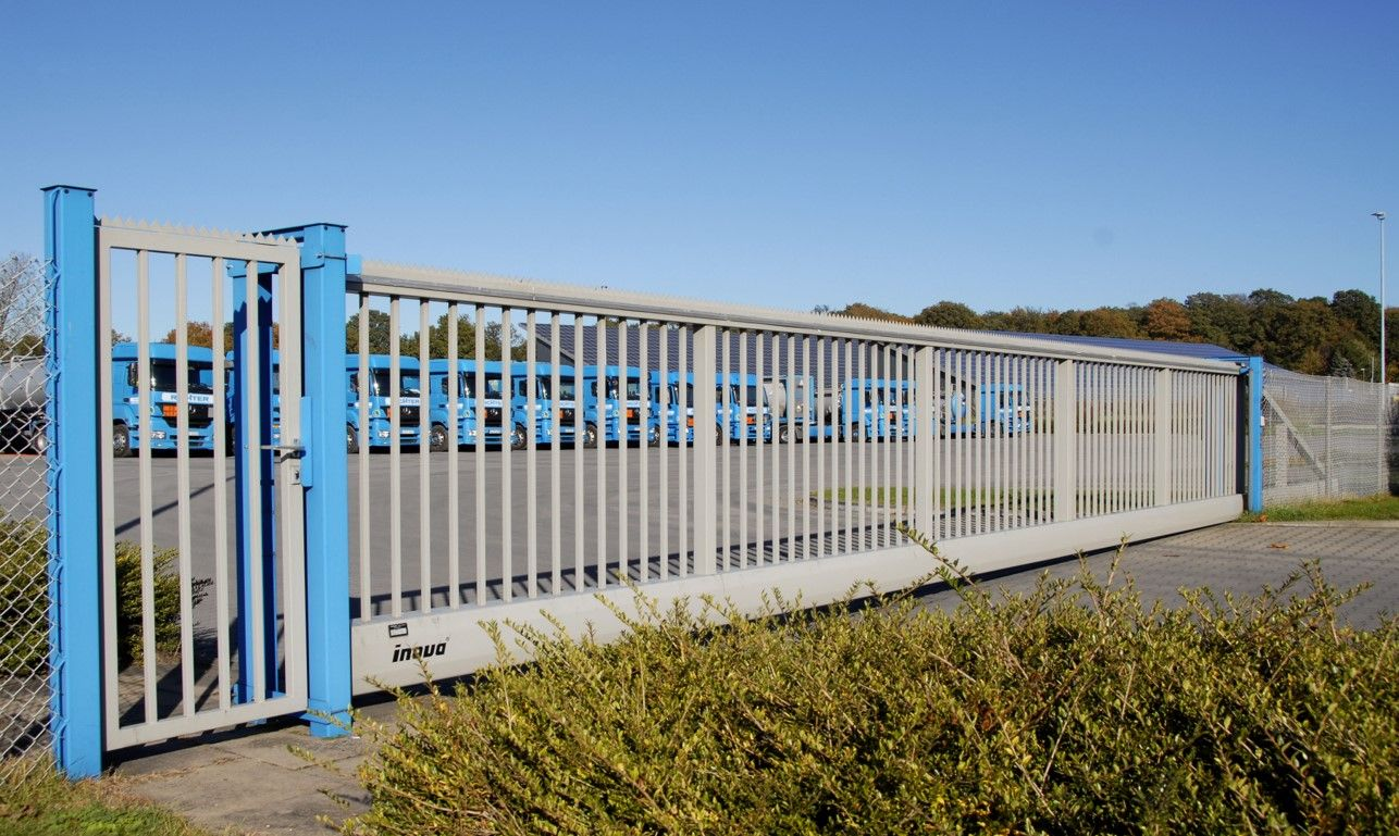 Schiebetoranlage Inova für den industriellen Einsatz